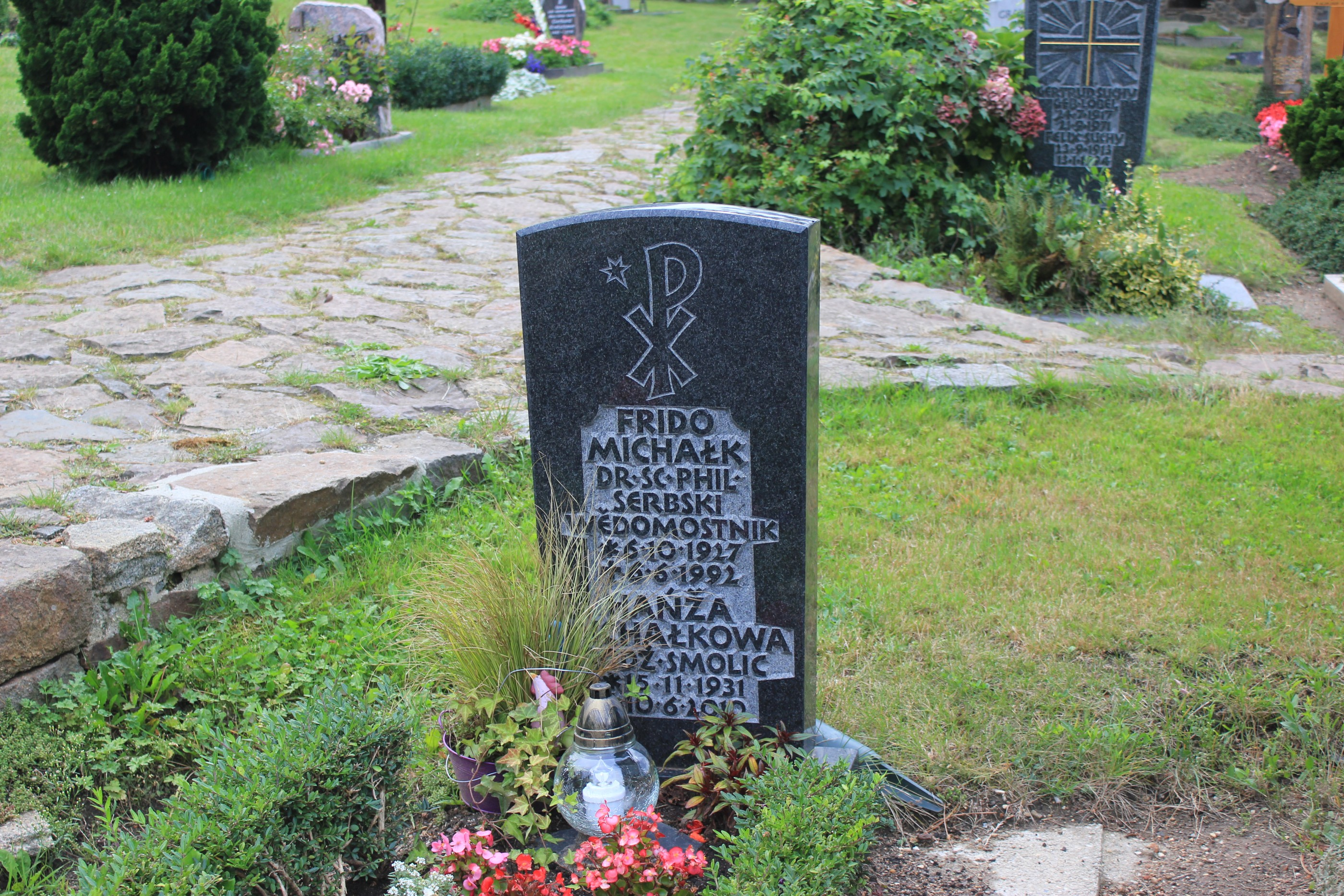 Hornjoserbsce: Row Frida Michałka na Budyskim Mikławšku.